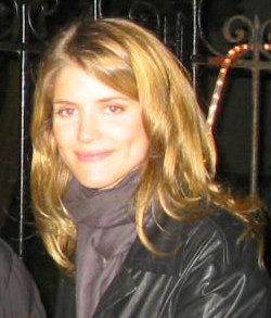 Alice Taglioni lors d'une avant-première de "L'île aux Trésors" à Dinard.